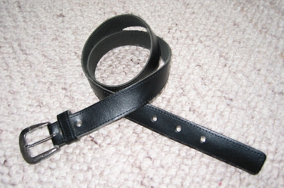 schwarzer Ledergürtel